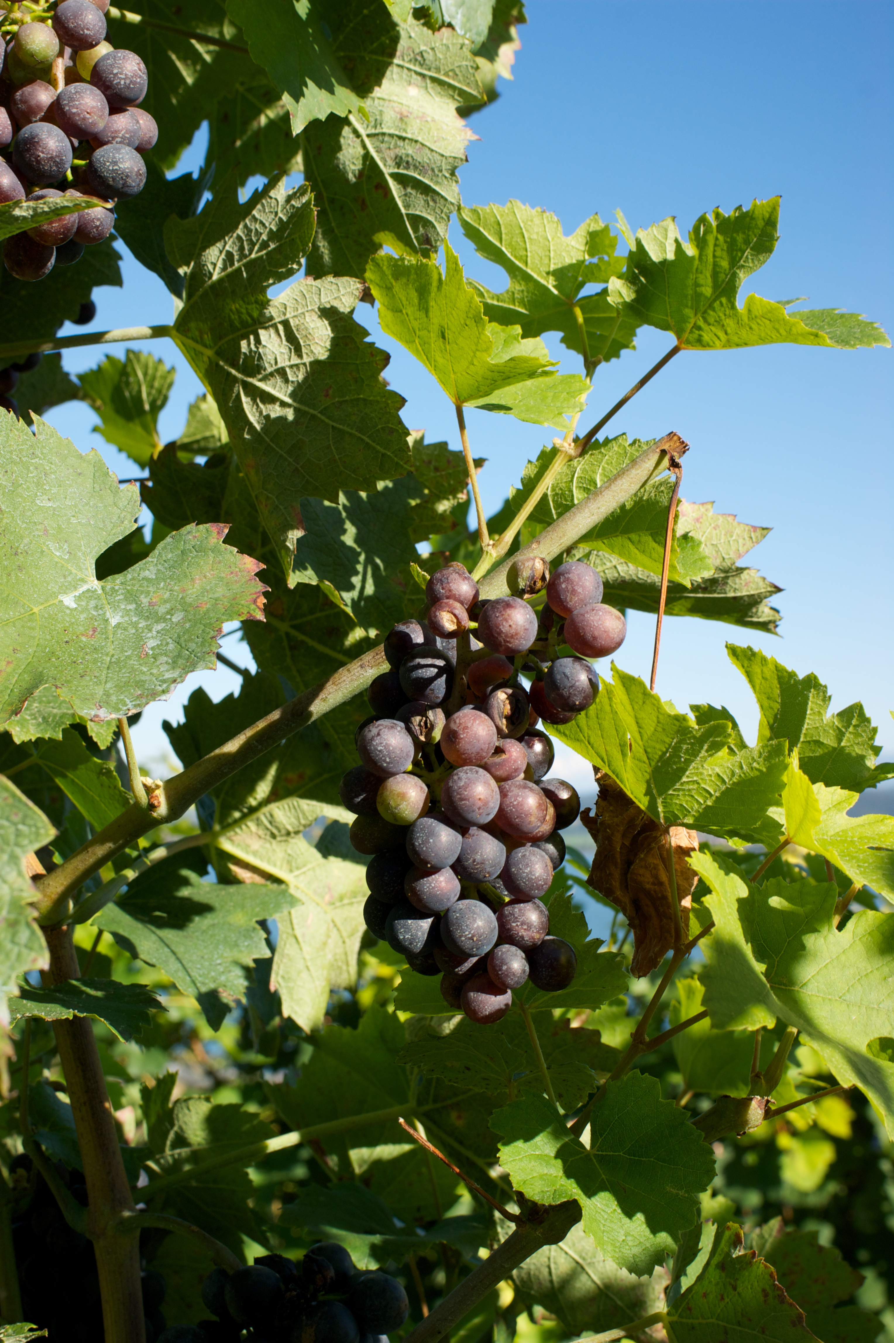 Grape de raisin du cépage Garanoir